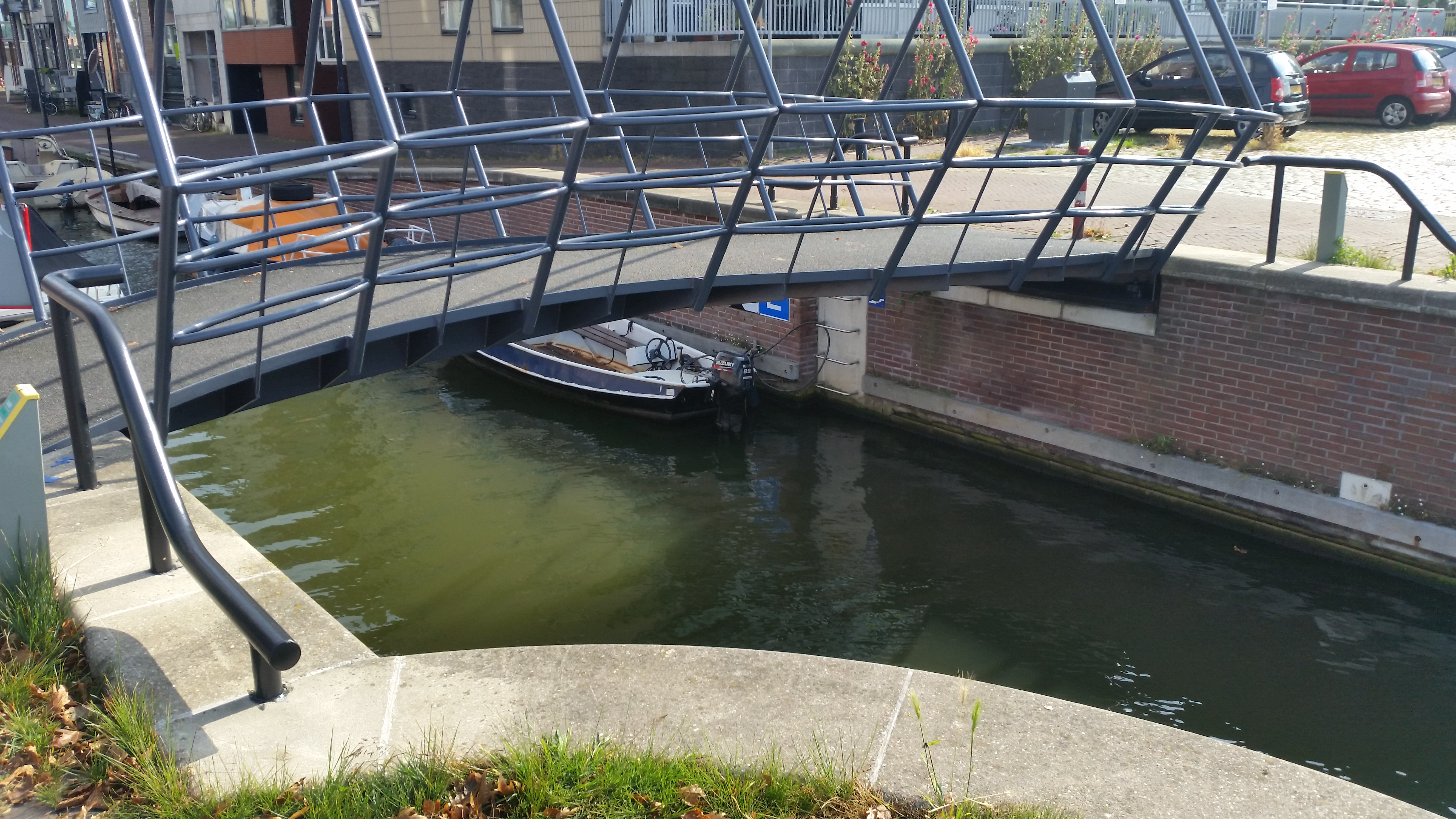 Zijaanzicht van Brug 1992, Word